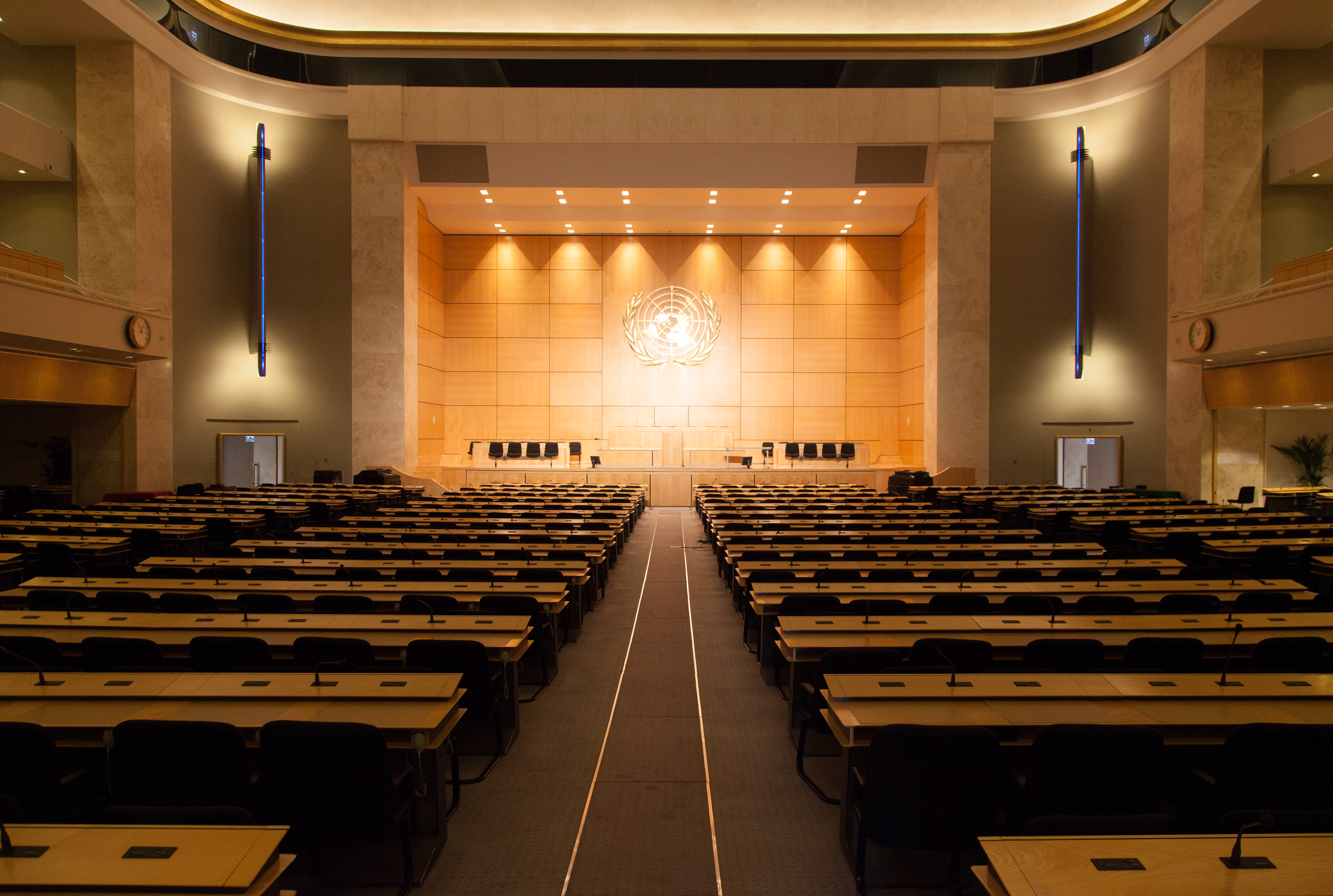 Vue de la salle des Assemblées